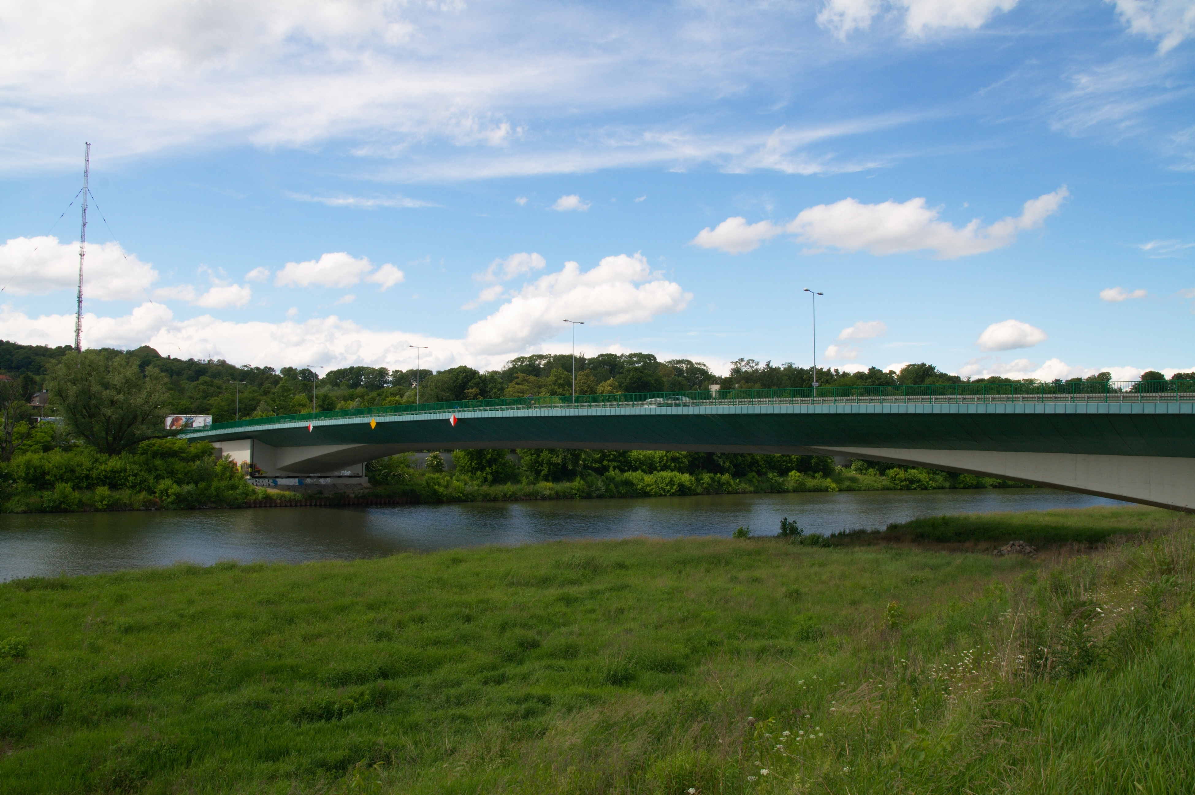 Most Zwierzyniecki w Krakowie